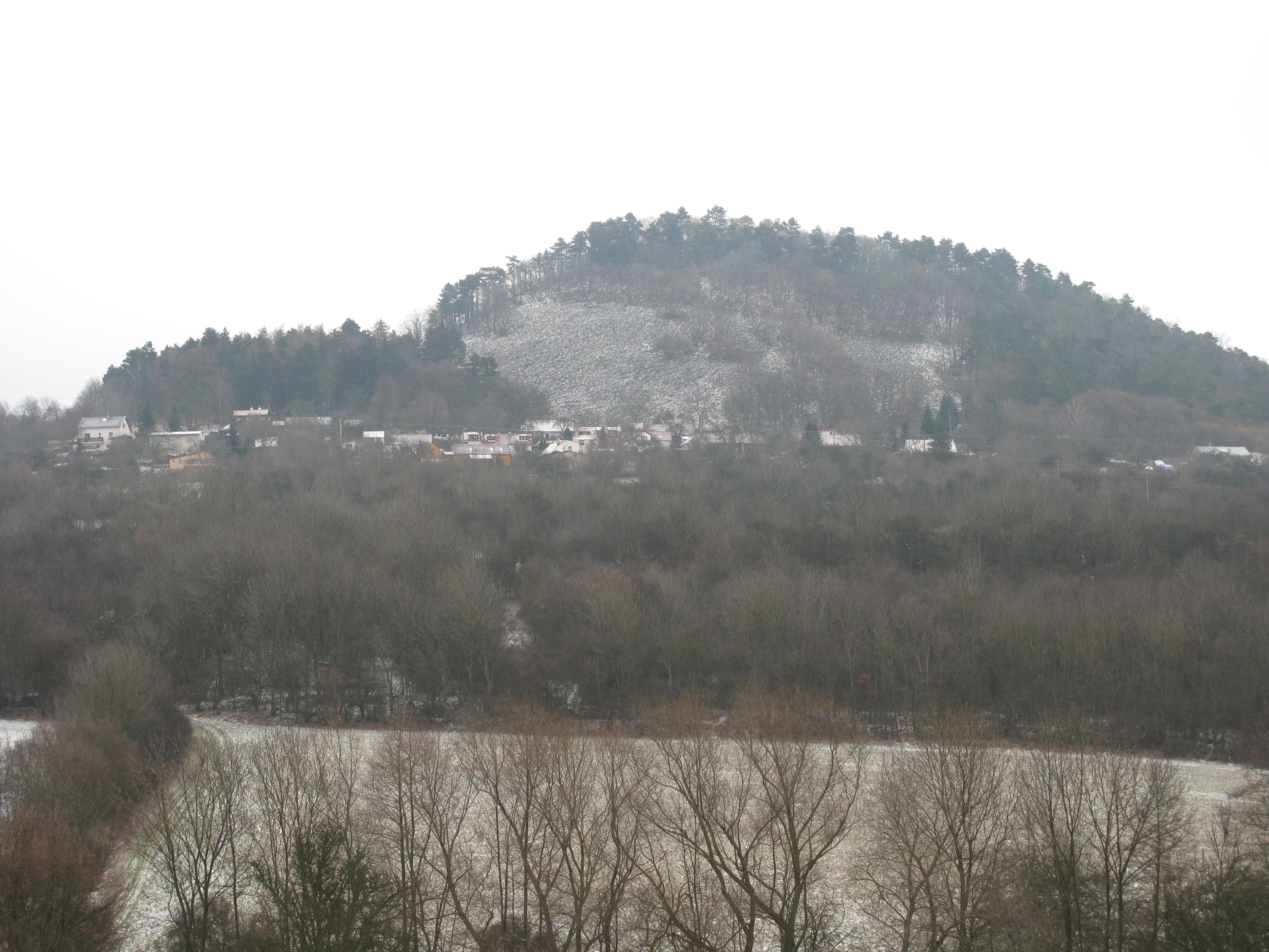 Blešno v pohledu ze Starého. Okres Litoměřice, Česká republika.